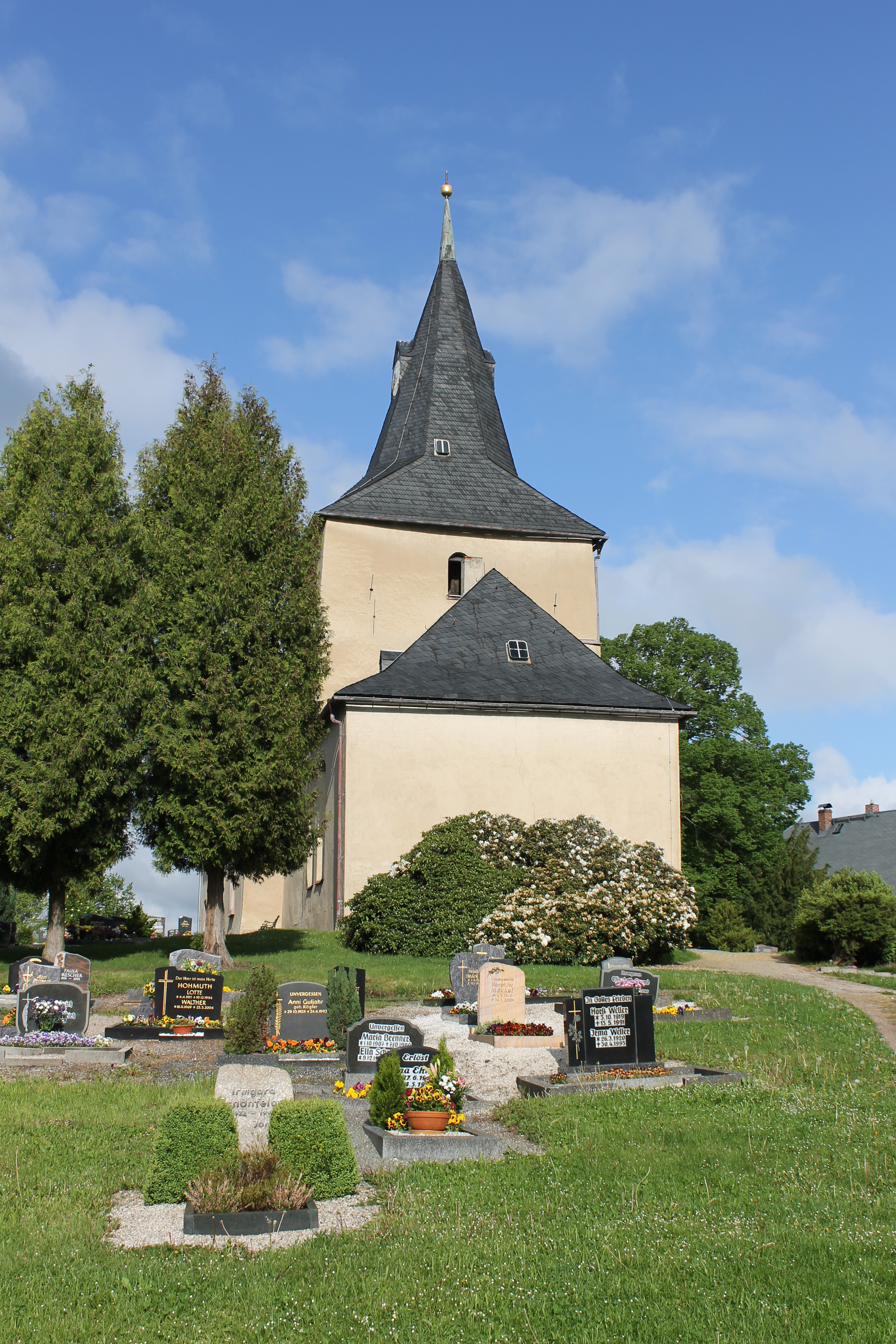 Ev.-Luth. Kirche zu den Drei Marien *** Härtensdorf; spätroman. Chorturmkirche; um 1150 errichtet, Nahwallfahrtsstätte mit Gnadenbild von Peter Breuer; seit 1529 ev.-luth., Begräbnisstätte der evang. Herren von Wildenfels; Mutterkirche der Stadt Wildenfels - alte Hofkirche der Herrschaft Wildenfels (Pfarrer von Härtensdorf war bis 1865 Hofprediger von Wildenfels; Gründungsstätte der 1. geschlossenen Bekennenden Gemeinde in Sachsen (Kirchenkampf im 3. Reich - Zeugnis des bürgerlichen Widerstandes)